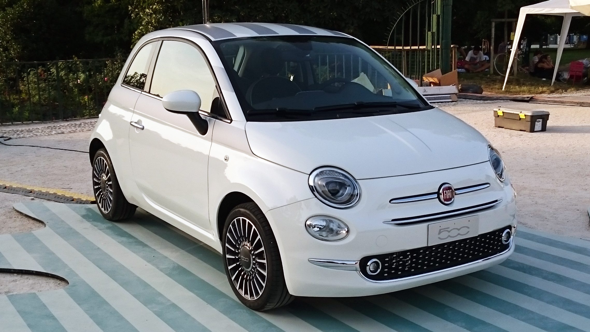 Il restyling della Fiat 500 nel luglio 2015 esposta al Parco Sempione di Milano (Castello Sforzesco). Alla presentazione erano presenti un modello viola e un modello bianco